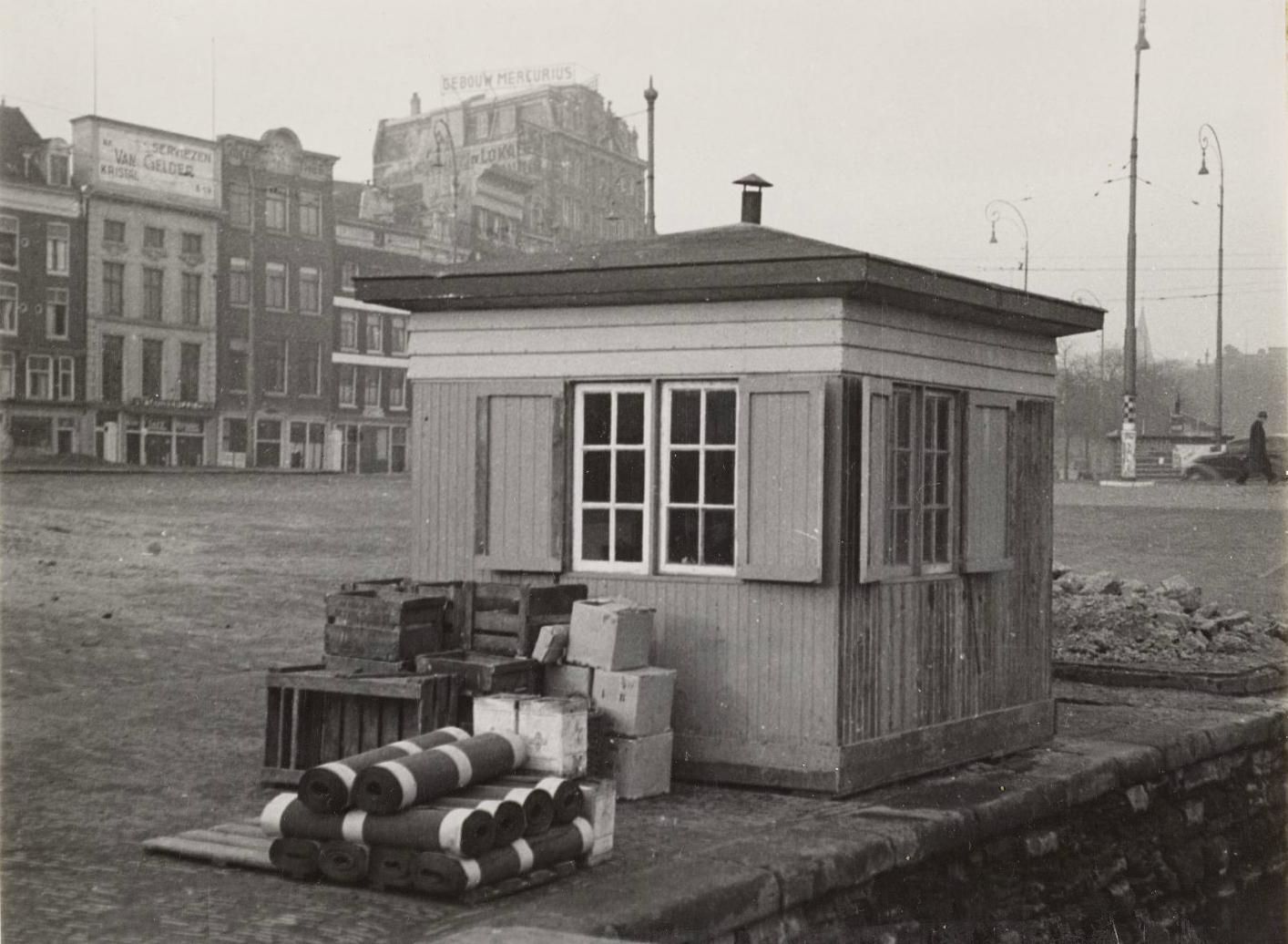 Een walhuisje voor de beurtvaart aan het Open Havenfront Op de achtergrond Prins Hendrikkade 20-32 (ged.) (v.r.n.l.). Op de nummers 20-21 gebouw Mercurius.